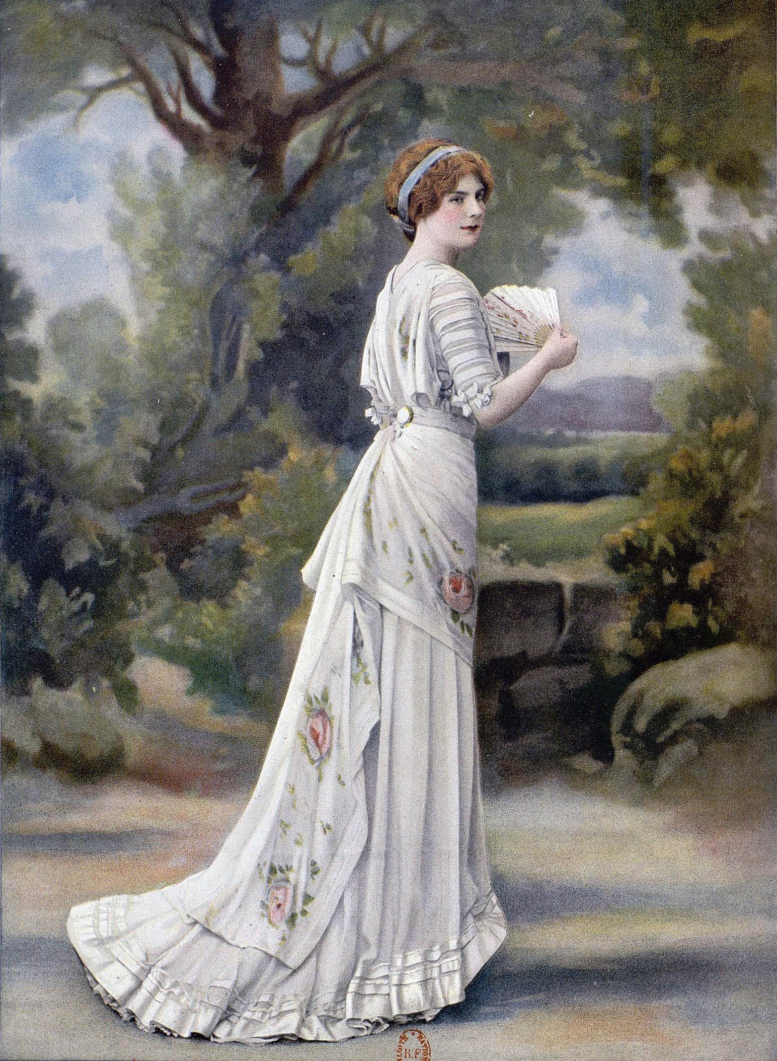 Robe de dîner par Redfern. "Robe en mousseline de soie blanche, bordée de larges rubans satinés, peints de roses pâles. Corsage et jupe drapés, manches faites de rubans." Photograph in Les Modes : Revue mensuelle illustrée des arts décoratifs appliqués à la femme.